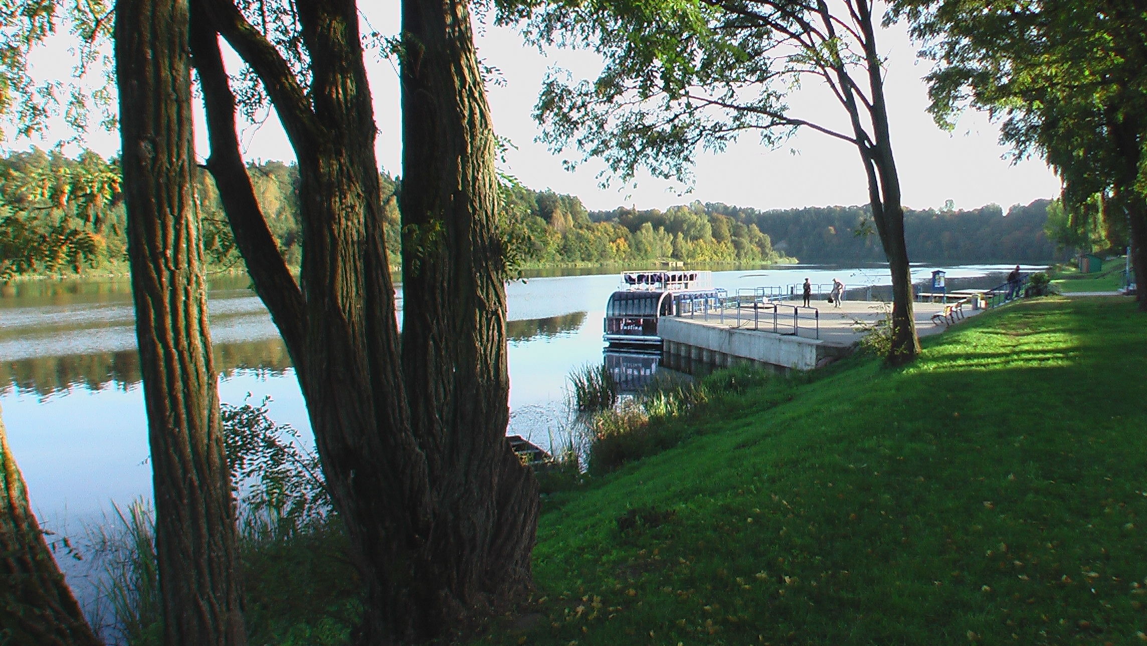 Fluss Nemunas bei Birstonas